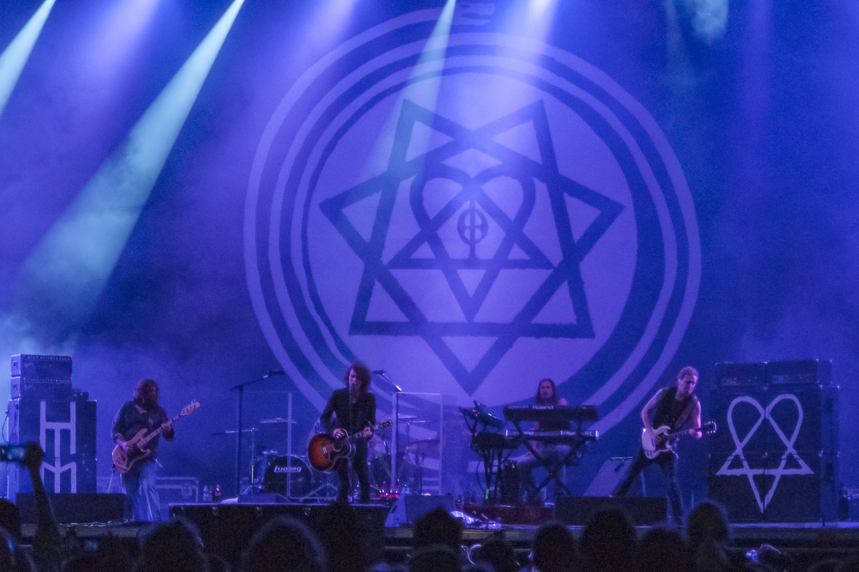 Zespół HIM podczas festiwalu Ursynalia 2013